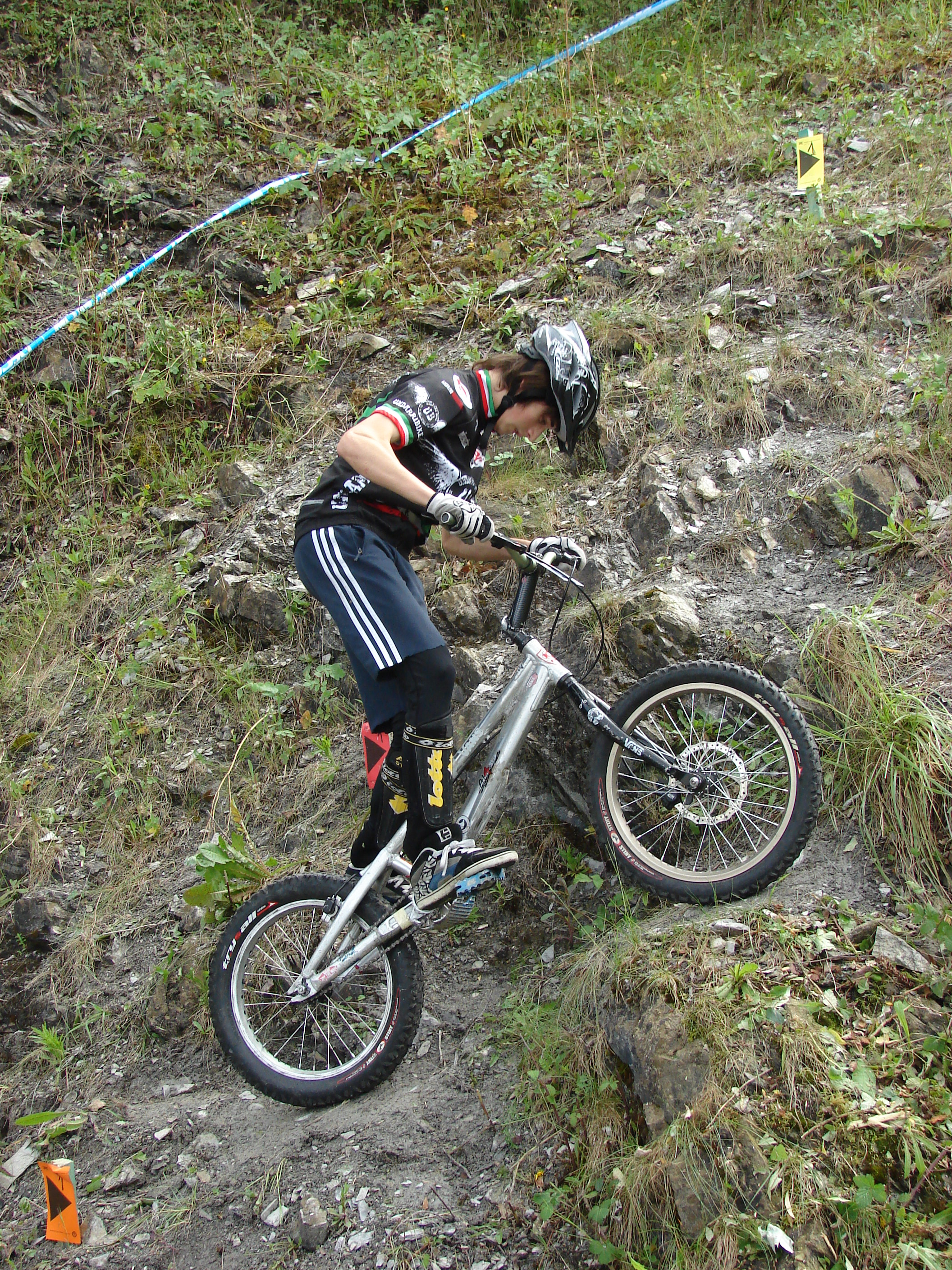 Irun 2011 - Euskadiko Txapelketa